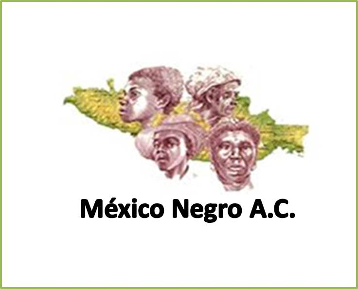 LOGOTIPO DE UNA A.C.